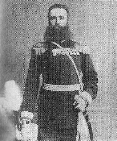 Портрет на майор Аврам Гуджев (1851-1895)